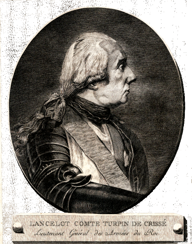 Lancelot Comte Turpin de Crissé Lieutenant Général des Armées du Roi